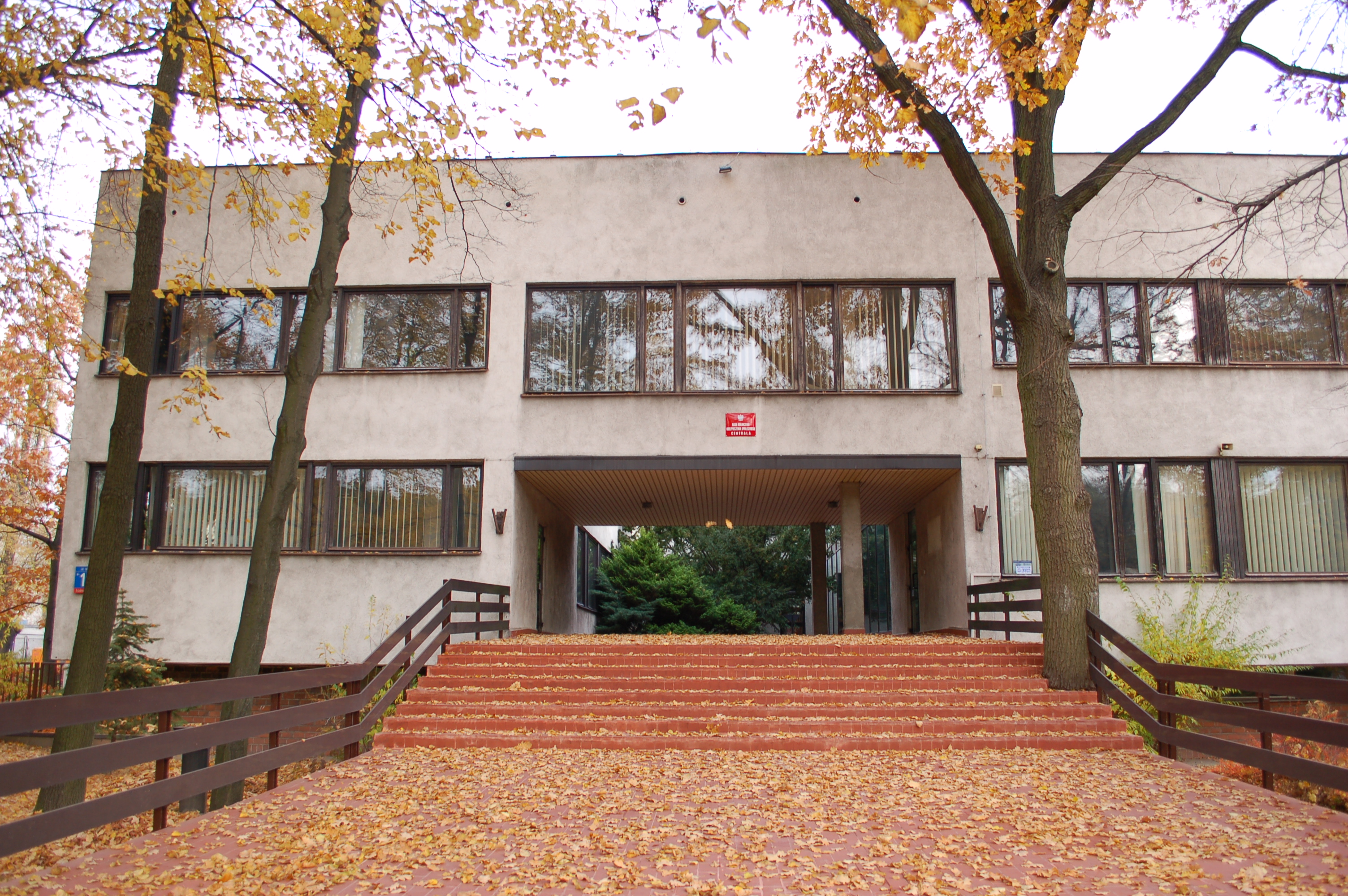 Pole Mokotowskie, Śródmieście-part, office